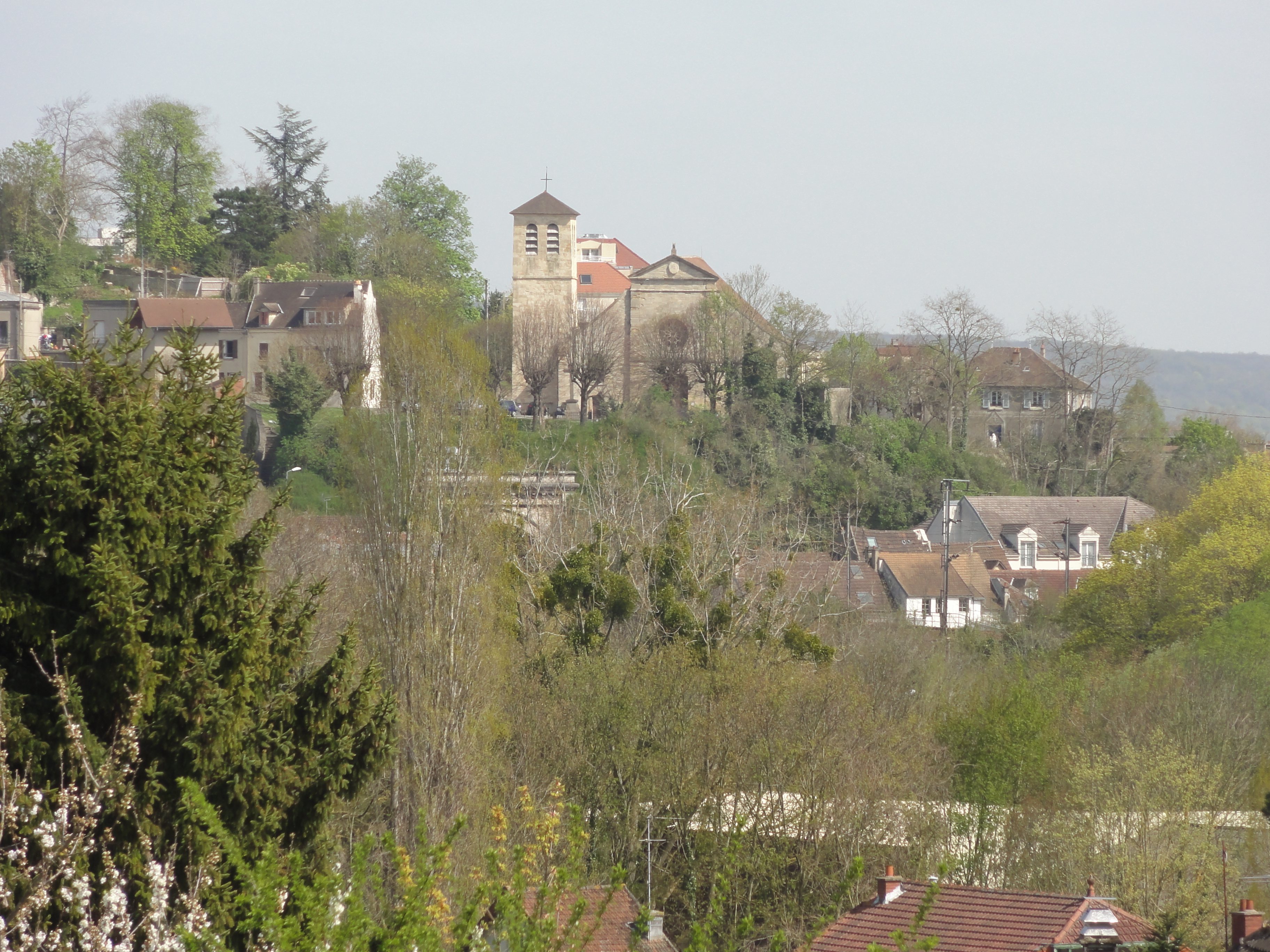 Église Saint-Nicolas de Meulan - voir titre.